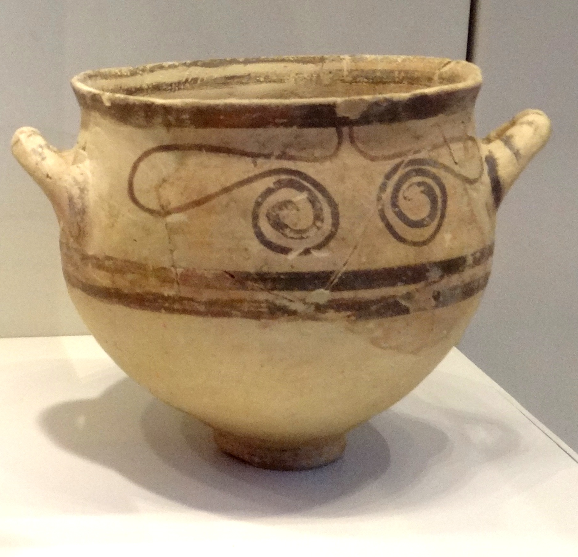 Philistine pottery קרמיקה פלשתית From Tel Miqne קערת שתייה מהמאה ה-12 לפני הספירה מתל מקנה (עקרון)